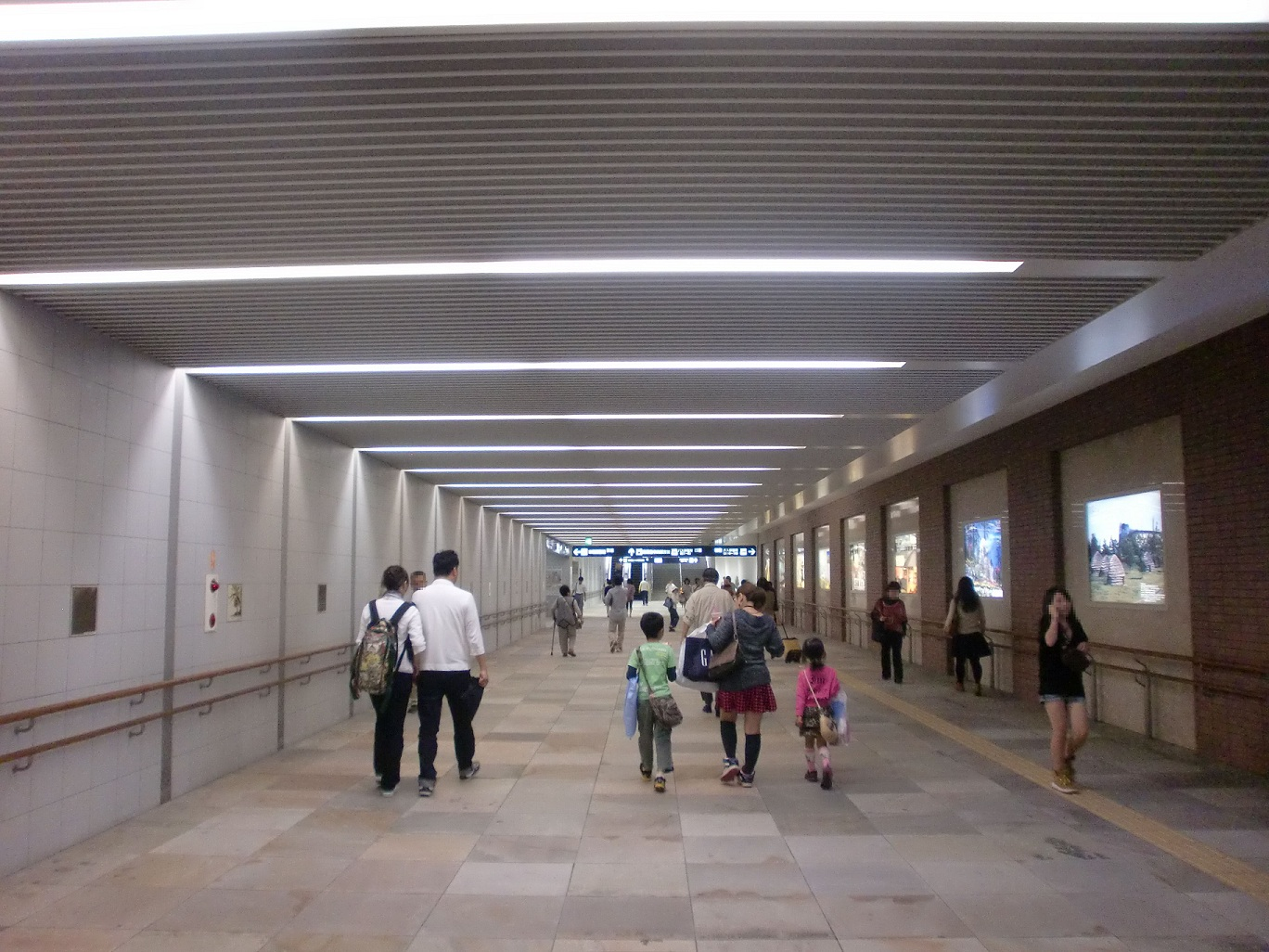 鹿児島中央駅前広場の地下通路を鹿児島中央ターミナルビル側から鹿児島中央駅方面に望む。